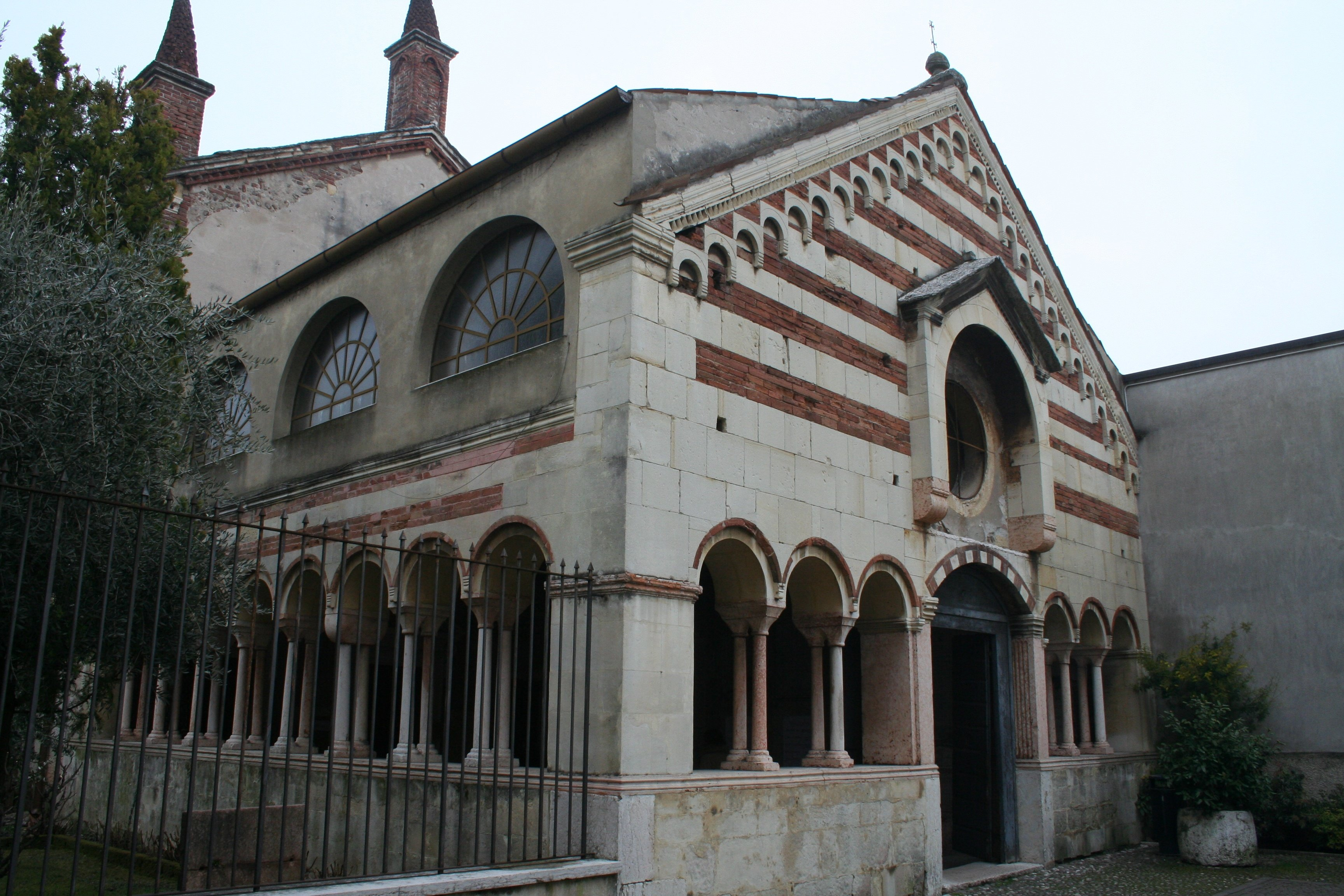 Verona-Chiesa SS.Trinità